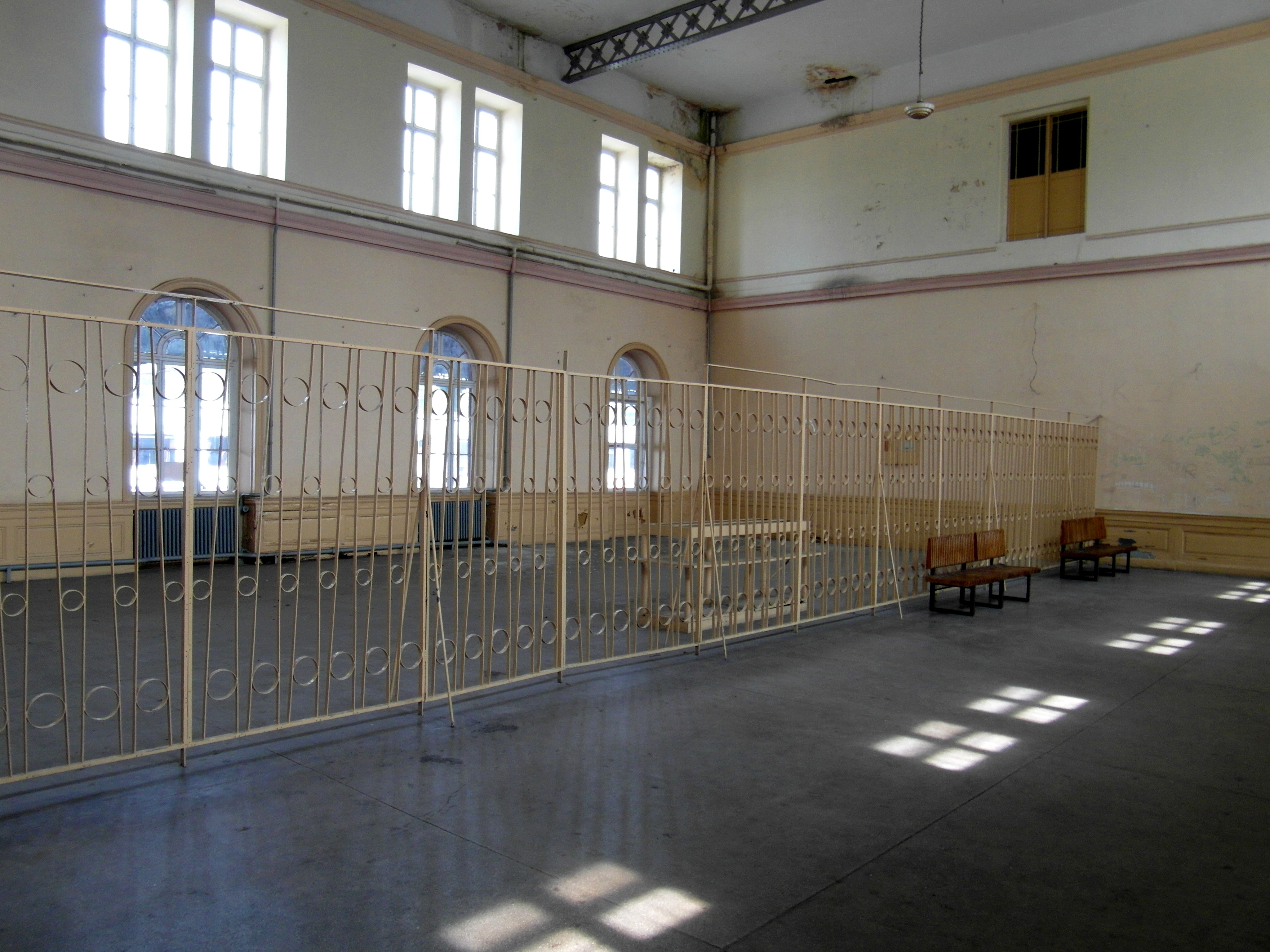 Kohlfurt - Bahnhof